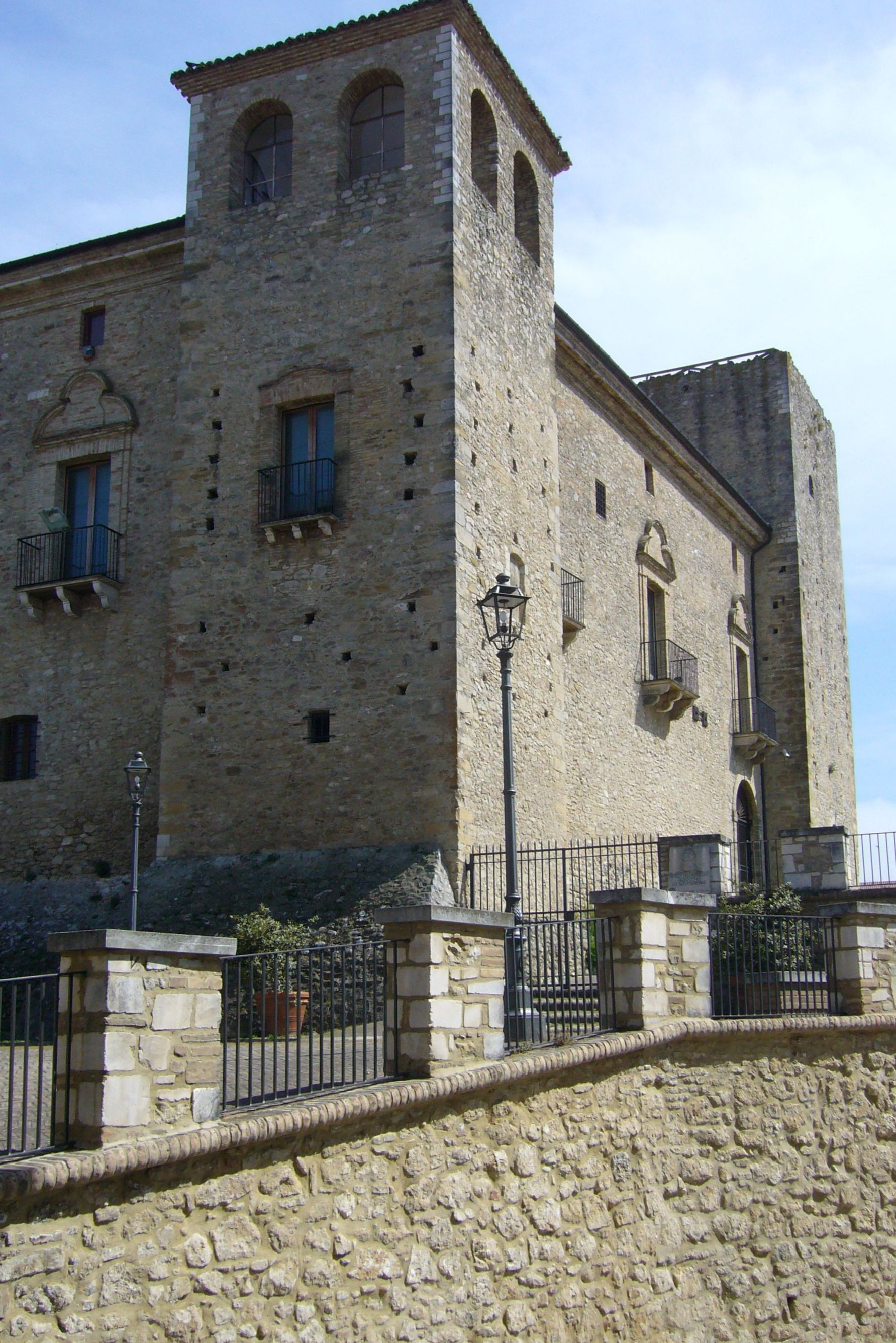 Il Castello